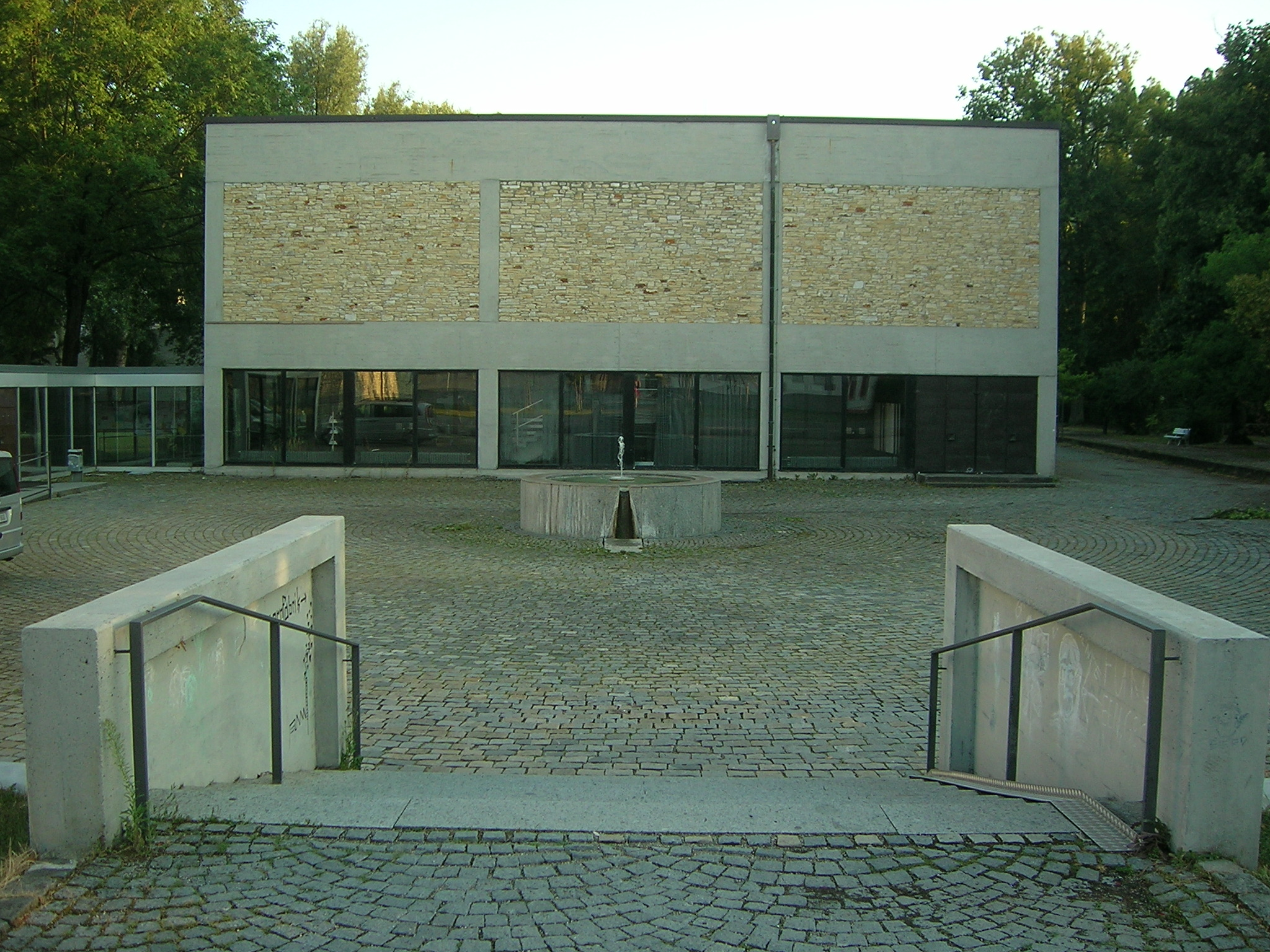 Ostenstraße 28 Eichstätt: Kollegiengebäude der Katholischen Universität Eichstätt-Ingolstadt.